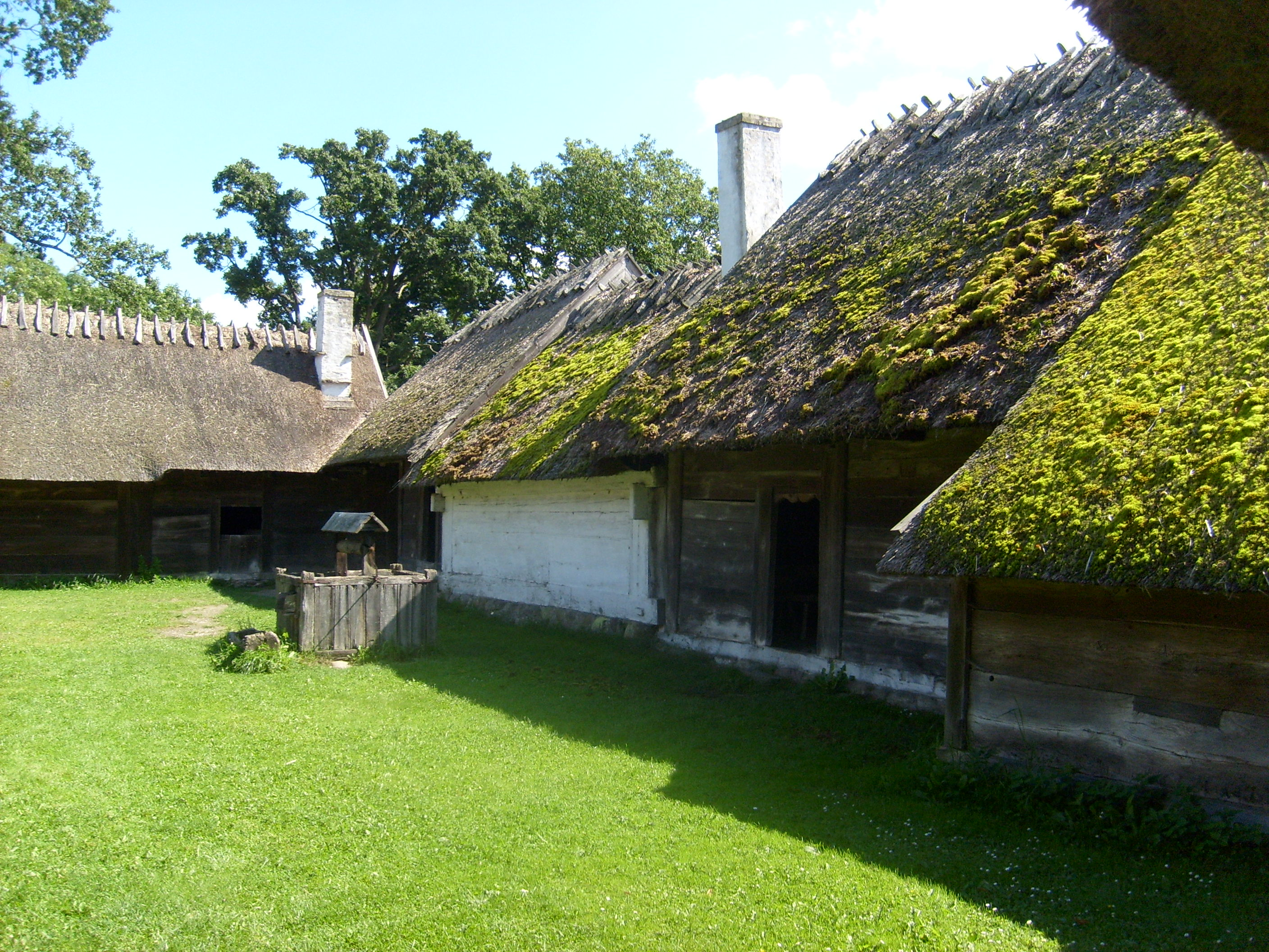 Gårdsexteriör Tvillinggården, gård 1737